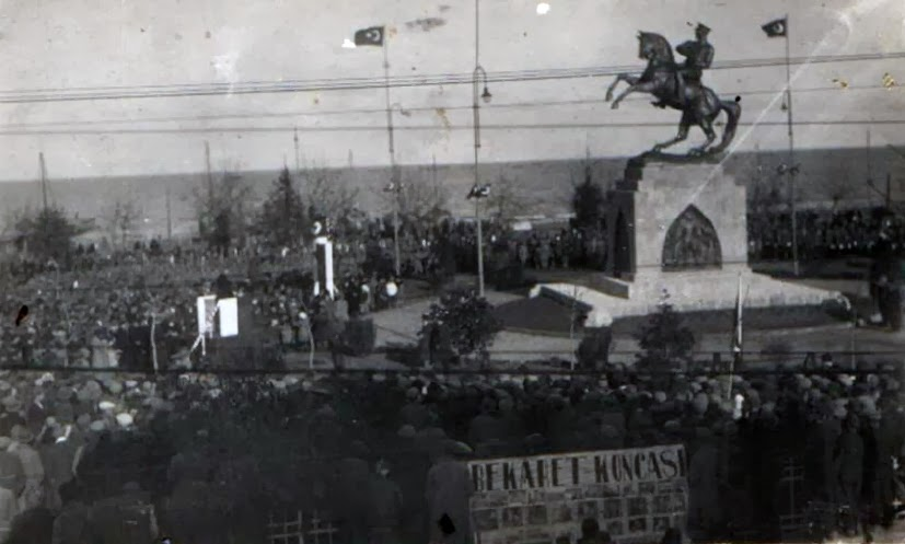 Onur Anıtı'nın açılış töreninde çekilmiş bir fotoğraf.